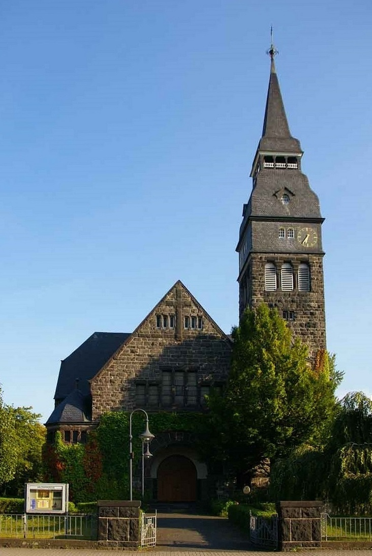 Langenfeld, evang. Erlöserkirche